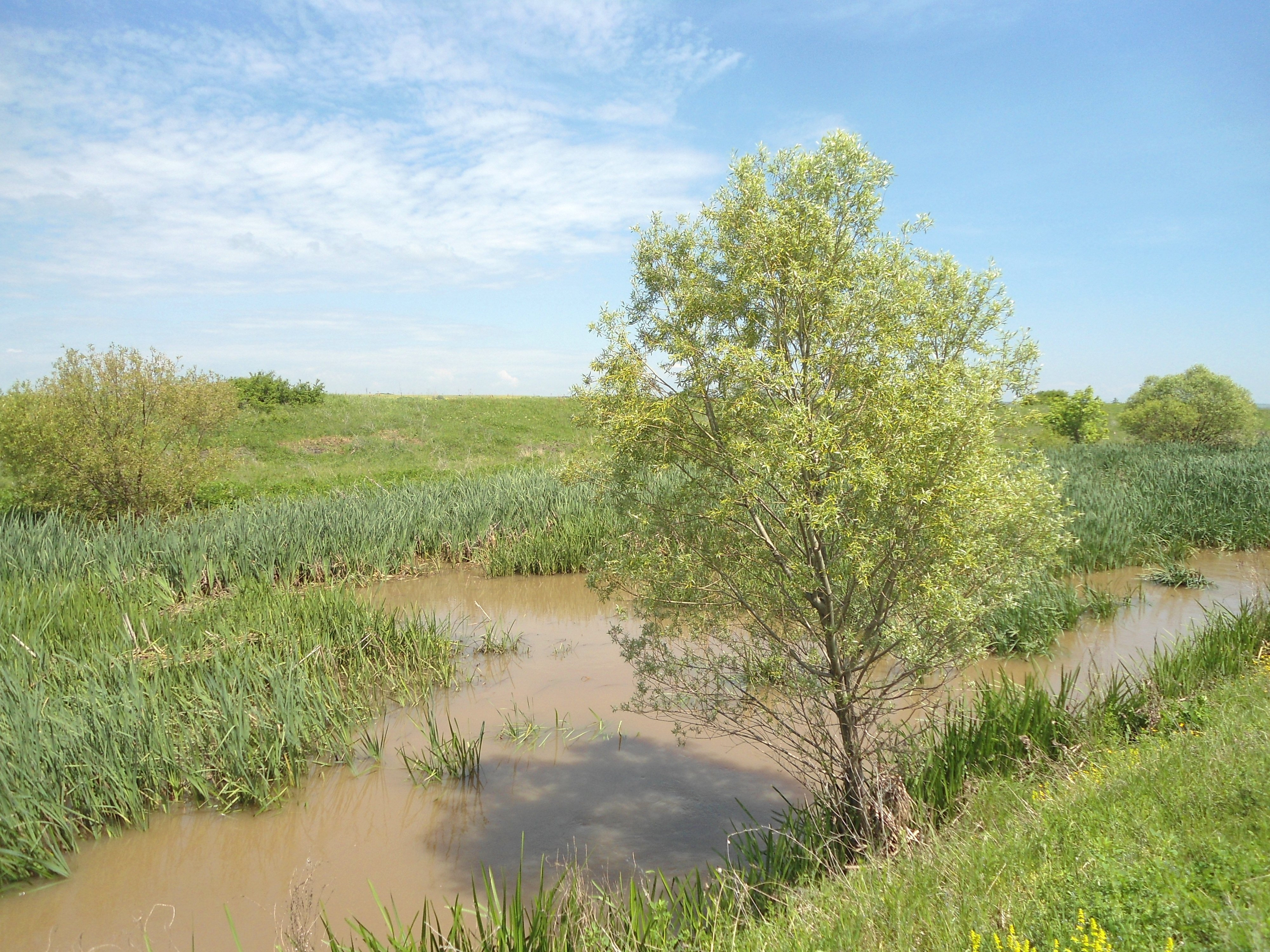 Река Поповска, приток на Тунджа.